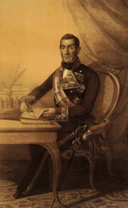 El mariscal de Campo Antonio Gallego Valcárcel (1787-1857), que llegó a ser ministro de la Guerra durante el reinado de Isabel II.